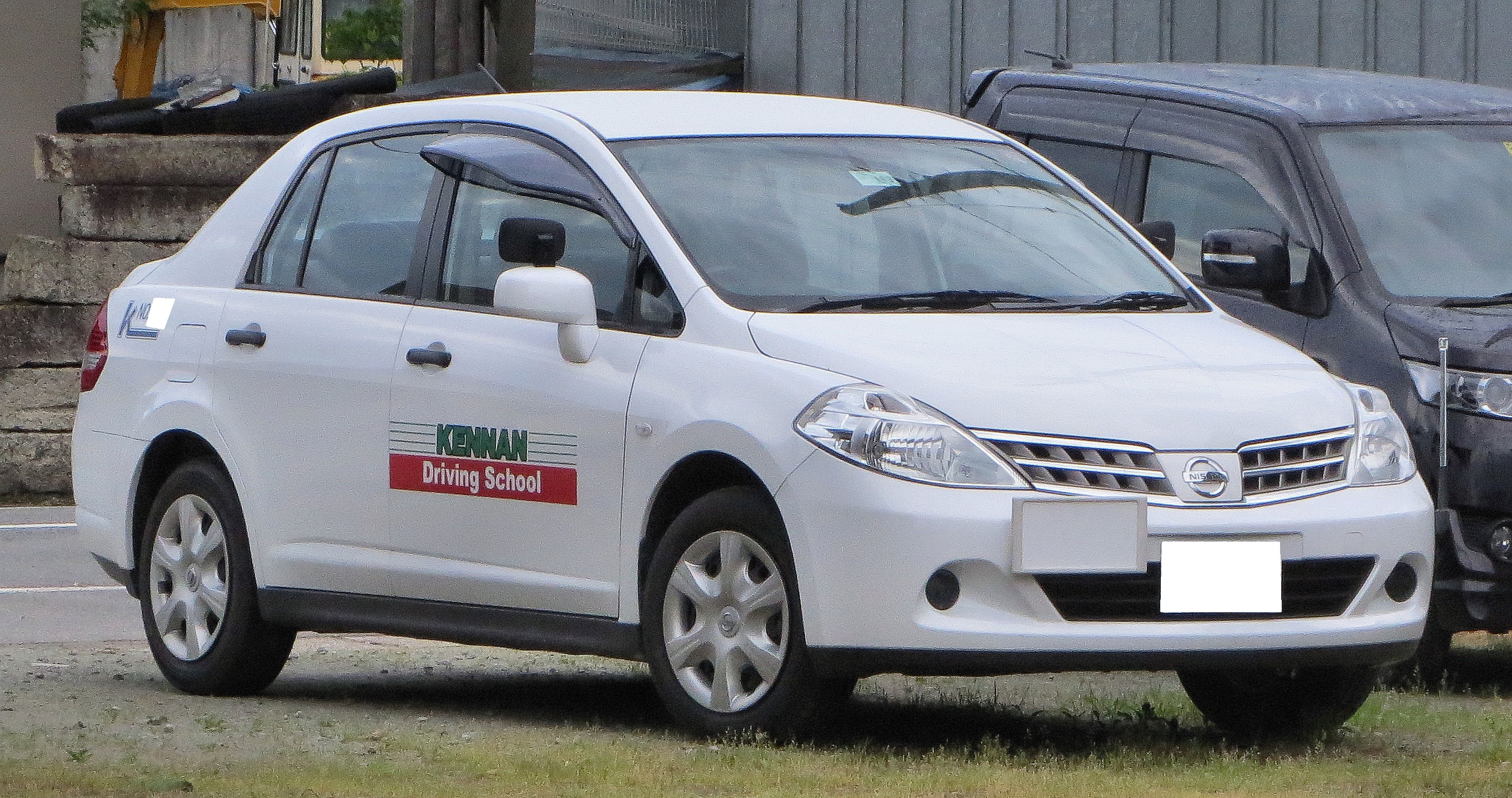 日産ティーダラティオ 後期型 県南自動車教習車（山形県)